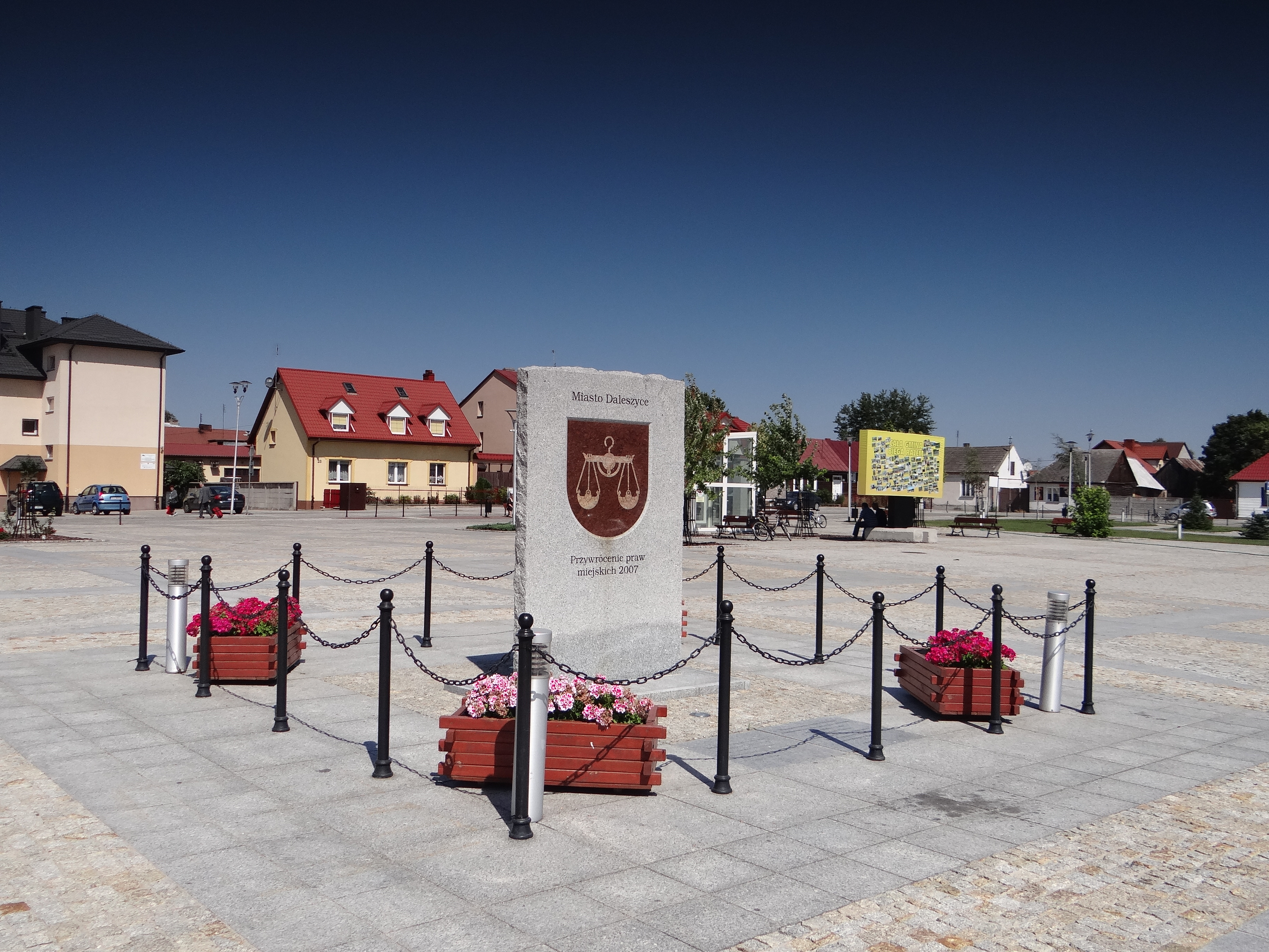 Náměstí v obci Daleszyce, Polsko